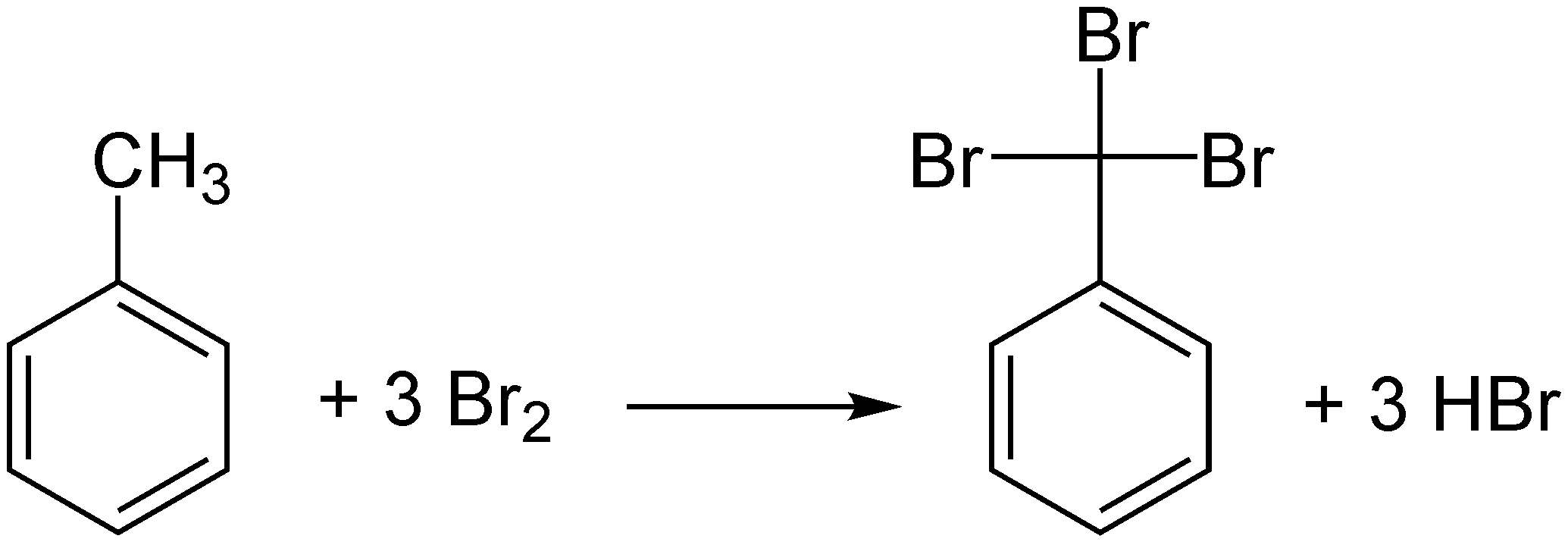 radikalische Substituierung von Toluol